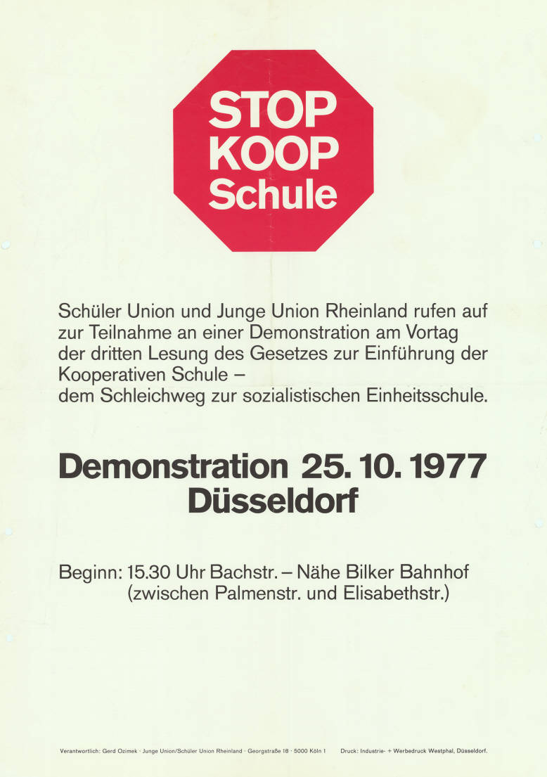 Stop Koop Schule Schüler Union und Junge Union Rheinland rufen auf zur Teilnahme an einer Demonstration am Vortag der dritten Lesung des Gesetzes zur Einführung der Kooperativen Schule - dem Schleichweg zur sozialistischen Einheitsschule. Demonstration ... Düsseldorf ... Abbildung: Stopschild Plakatart: Ankündigungsplakat Auftraggeber: Verantw.: Gerd Ozimek . Junge Union/Schüler Union Rheinland, Köln Drucker_Druckart_Druckort: Industrie + Werbedruck Westphal, Düsseldorf Objekt-Signatur: 10-028 : 1001 Bestand: Plakate von Jugendorganisationen der Parteien ( 10-028) GliederungBestand10-18: Plakate von Jugendorganisationen der Parteien (10-028) » Schüler Union Lizenz: KAS/ACDP 10-028 : 1001 CC-BY-SA 3.0 DE